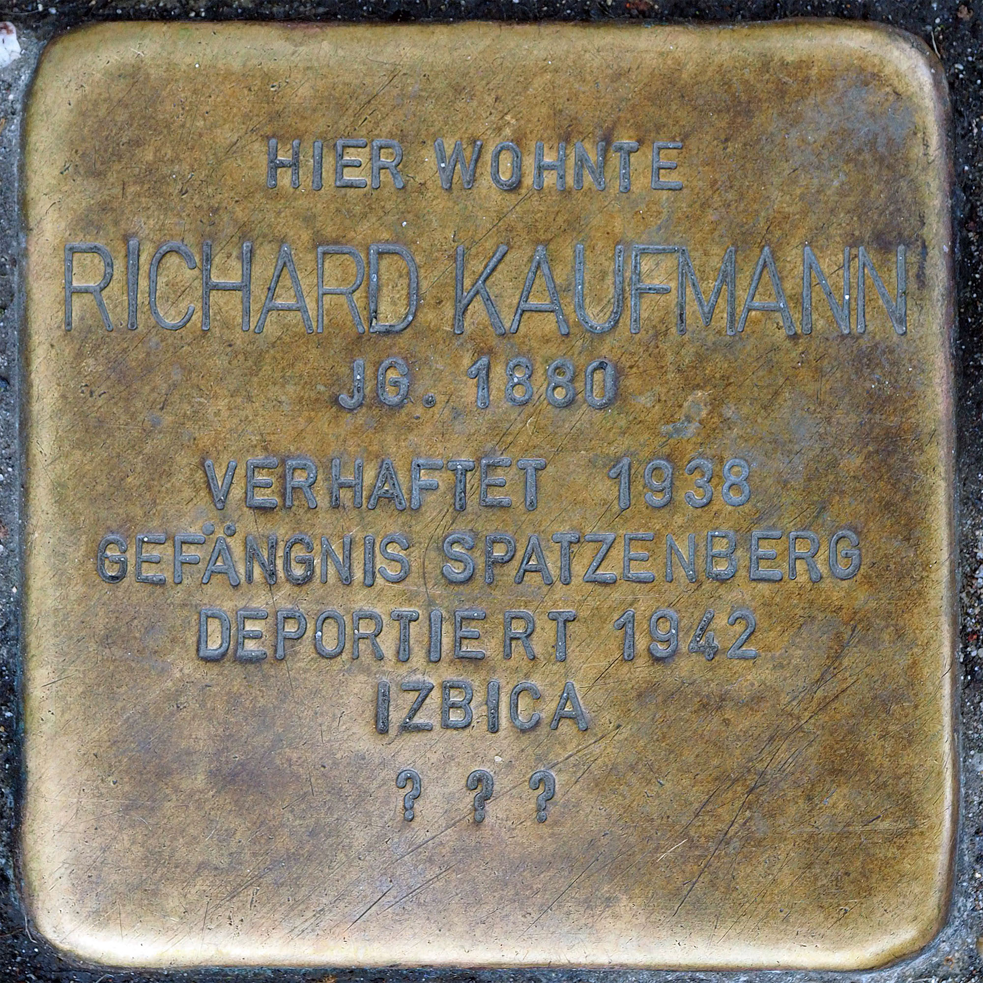 Stolpersteine MG: Kaufmann, Richard